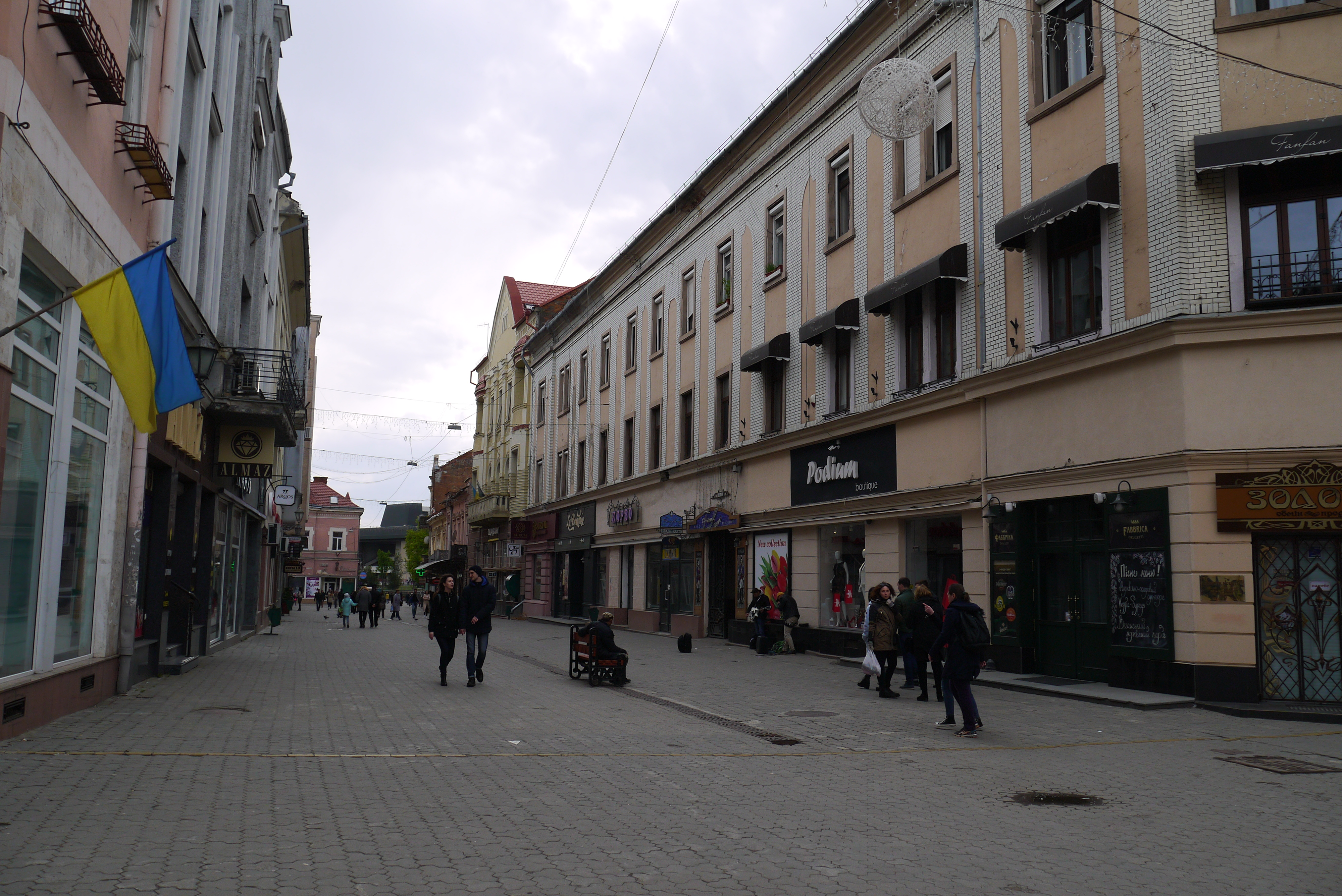 Житловий будинок, колишній «Білий корабель», Ужгород, вул. Корзо, 17